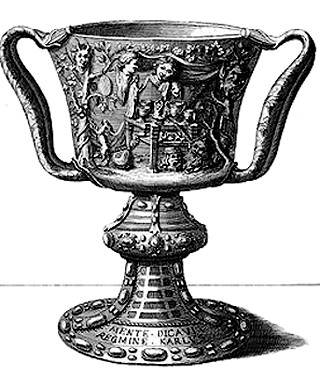 Gravure représantant la coupe avant le vol de 1804. Gravure dans Histoire de l'abbaye de Saint Denys en France, 1706, Michel Félibien.